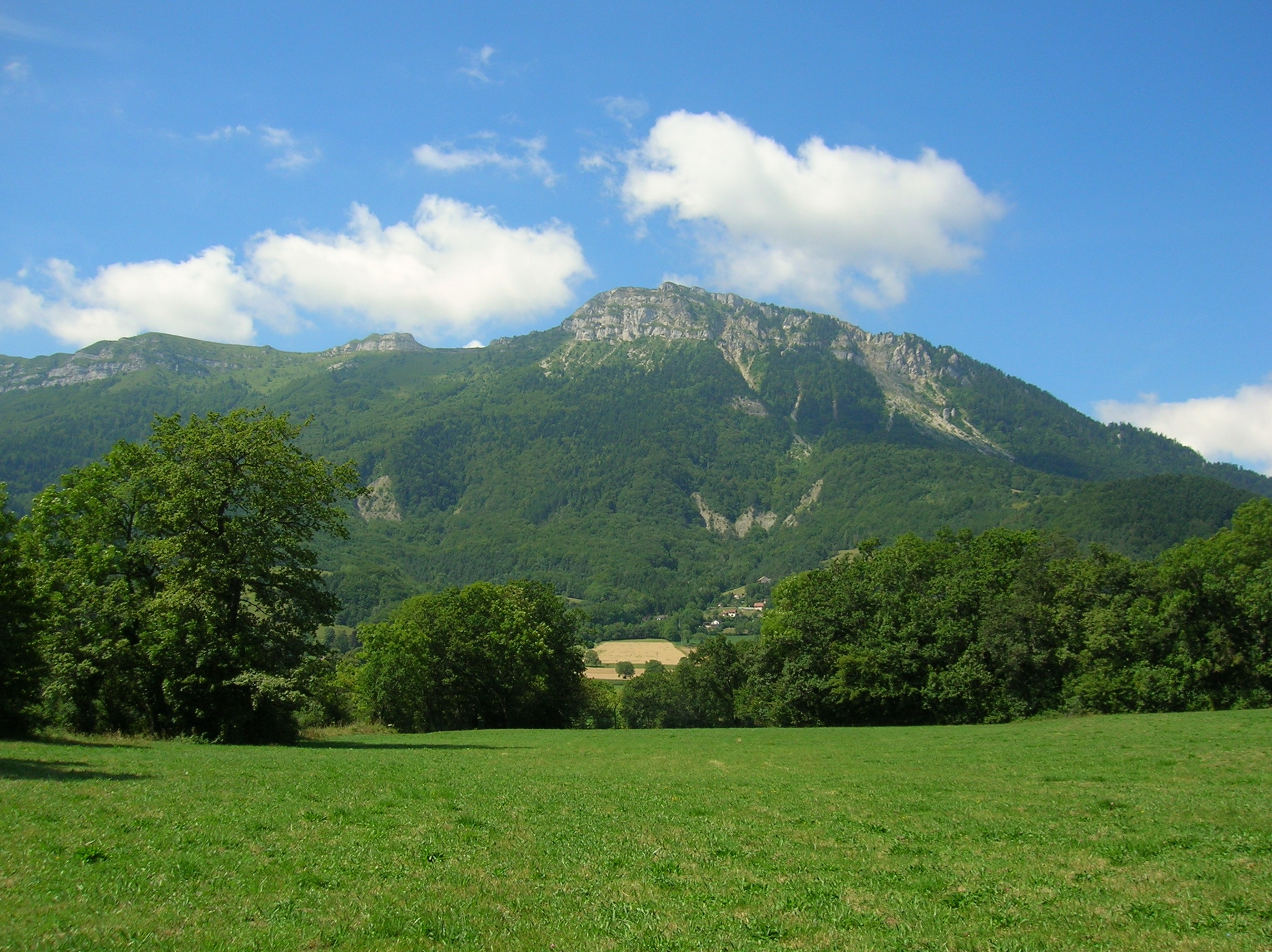 Grisail (Saint-Guillaume) vu depuis Rivoiranche, hameau de Saint-Paul-lès-Monestier, Isère, AuRA, France.